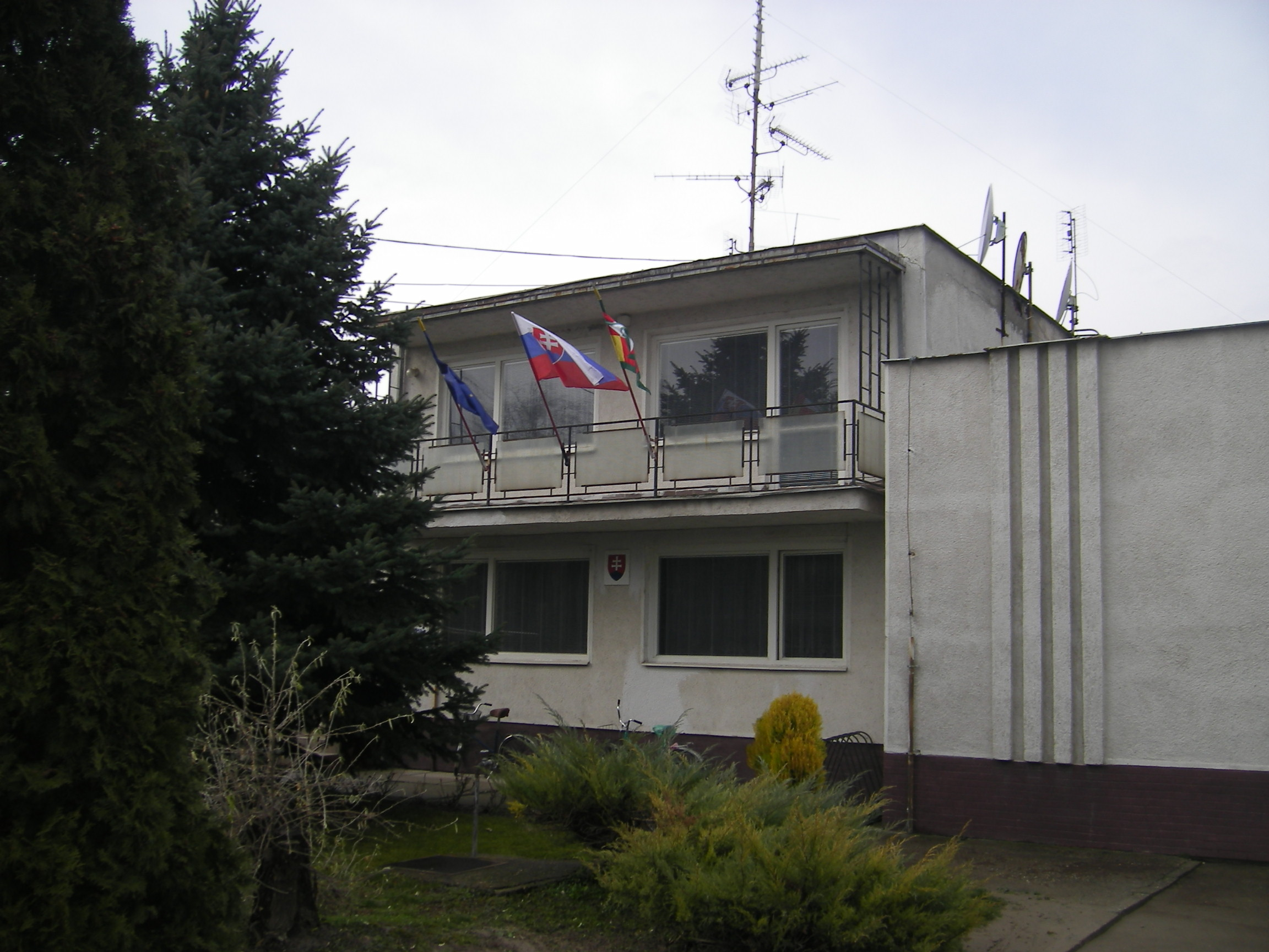 Izsa - községi hivatal